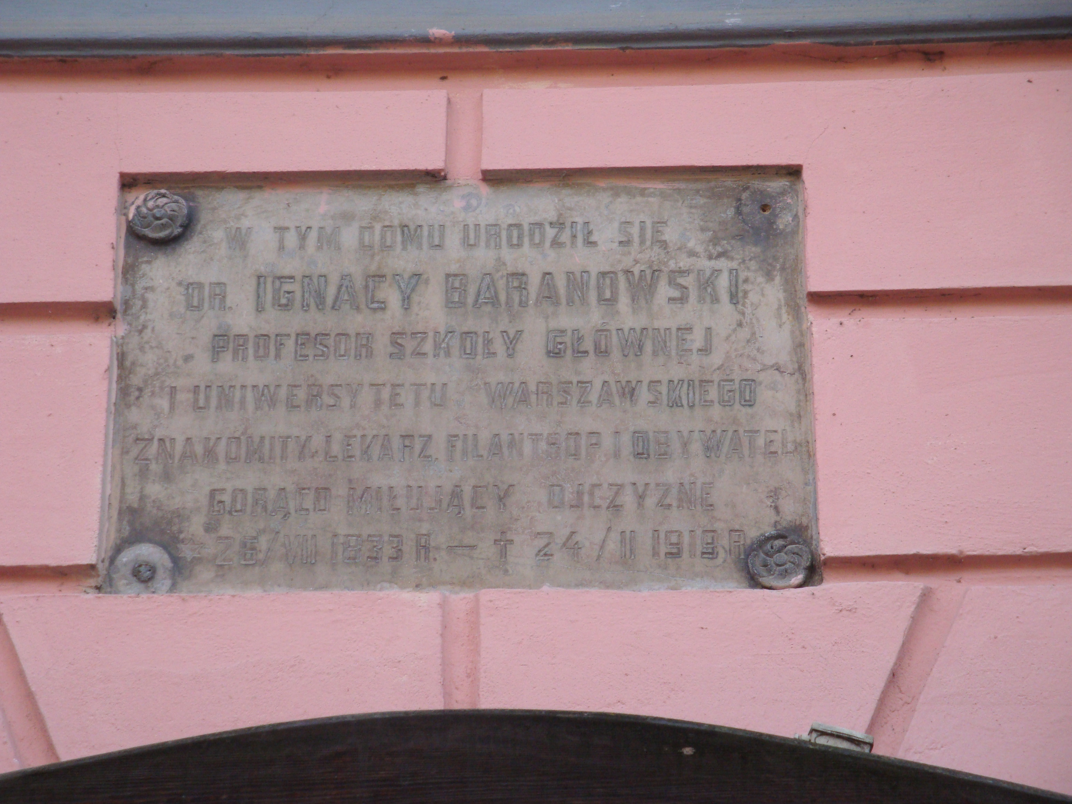 Tablica upamiętniająca narodziny Henryka Winiawskiego na budynku Rynek 17 w Lublinie.